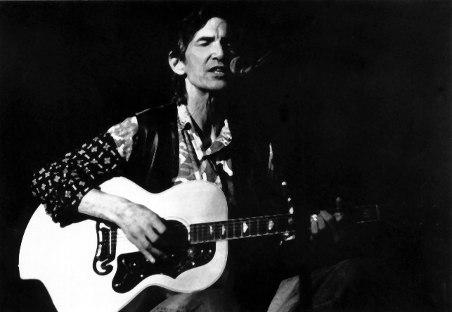 Singer-Songwriter Townes Van Zandt in Concert at "Kult" Niederstetten, Germany